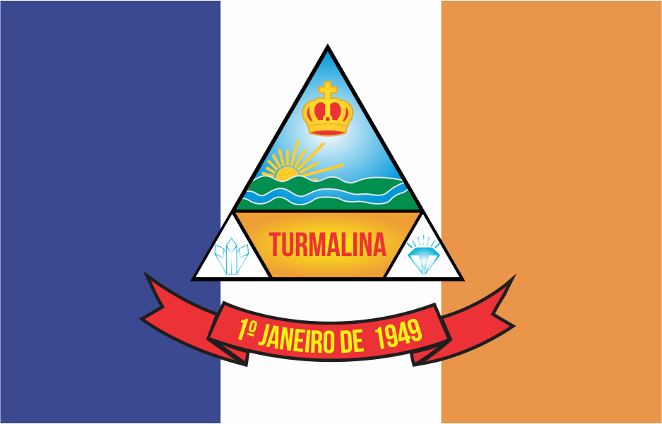 Brandeira de Turmalina MG